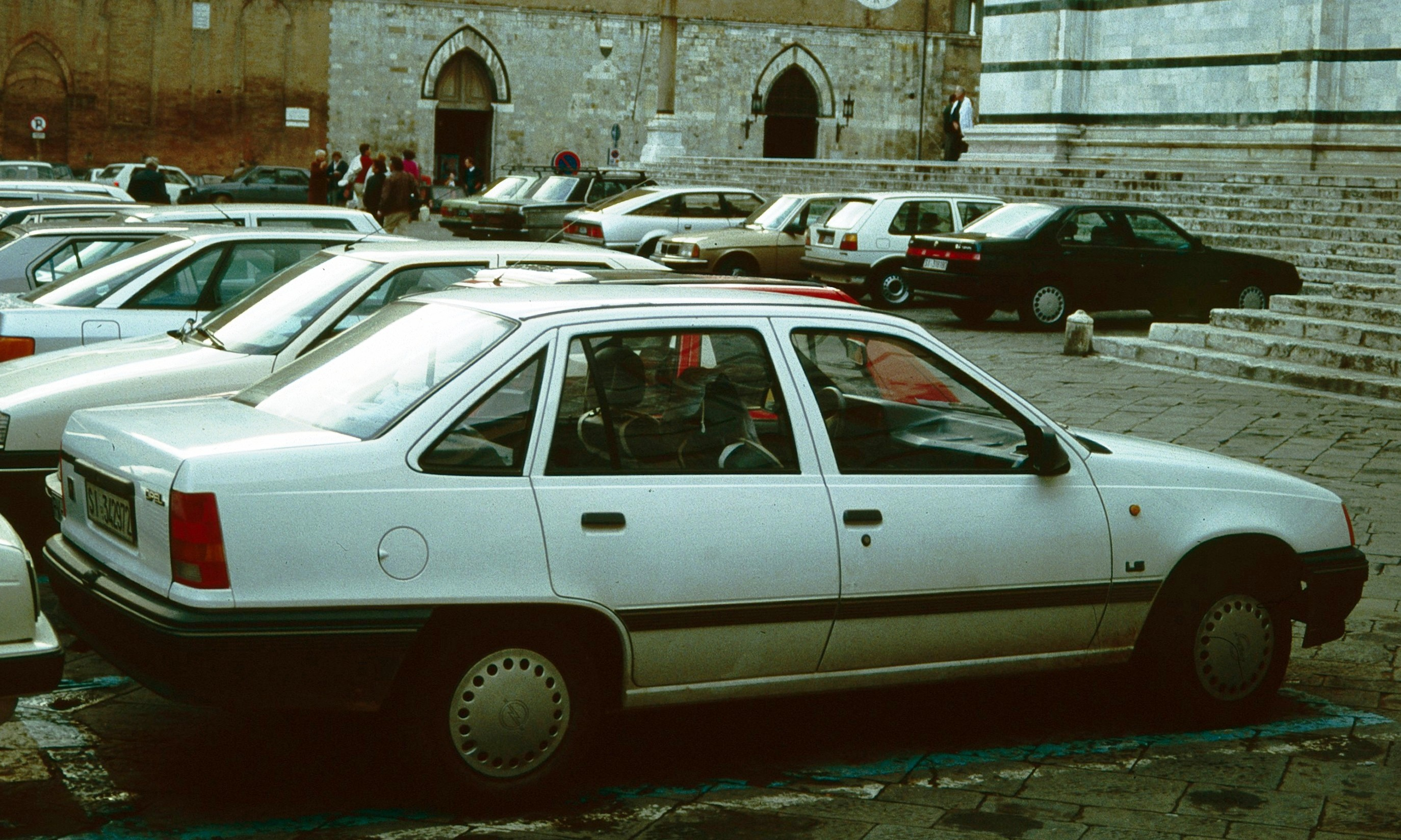 Opel Kadett Notchback beside Duomo in Siena